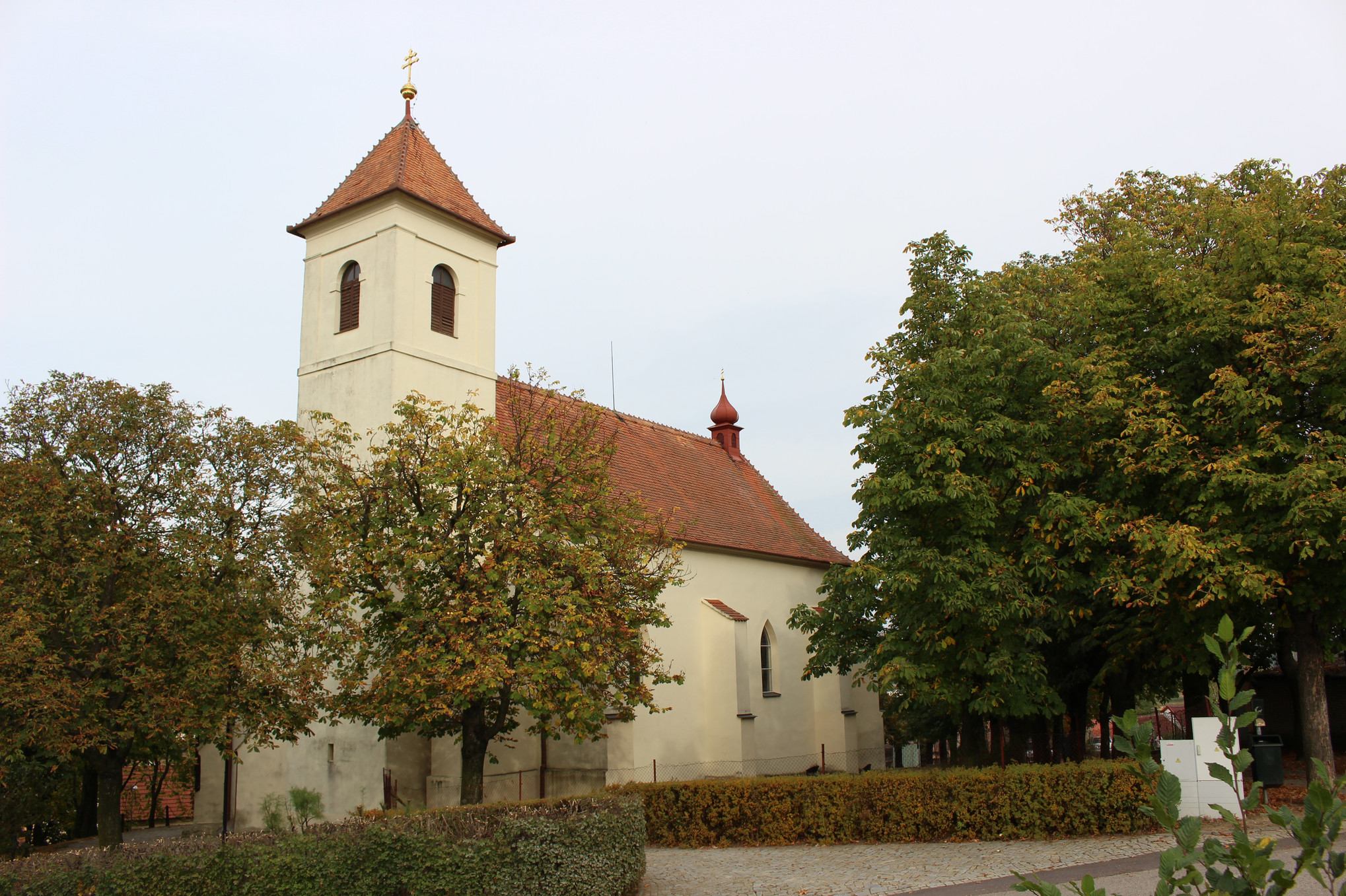 Únanov, okres Znojmo, Jihomoravský kraj, kostel svatého Prokopa